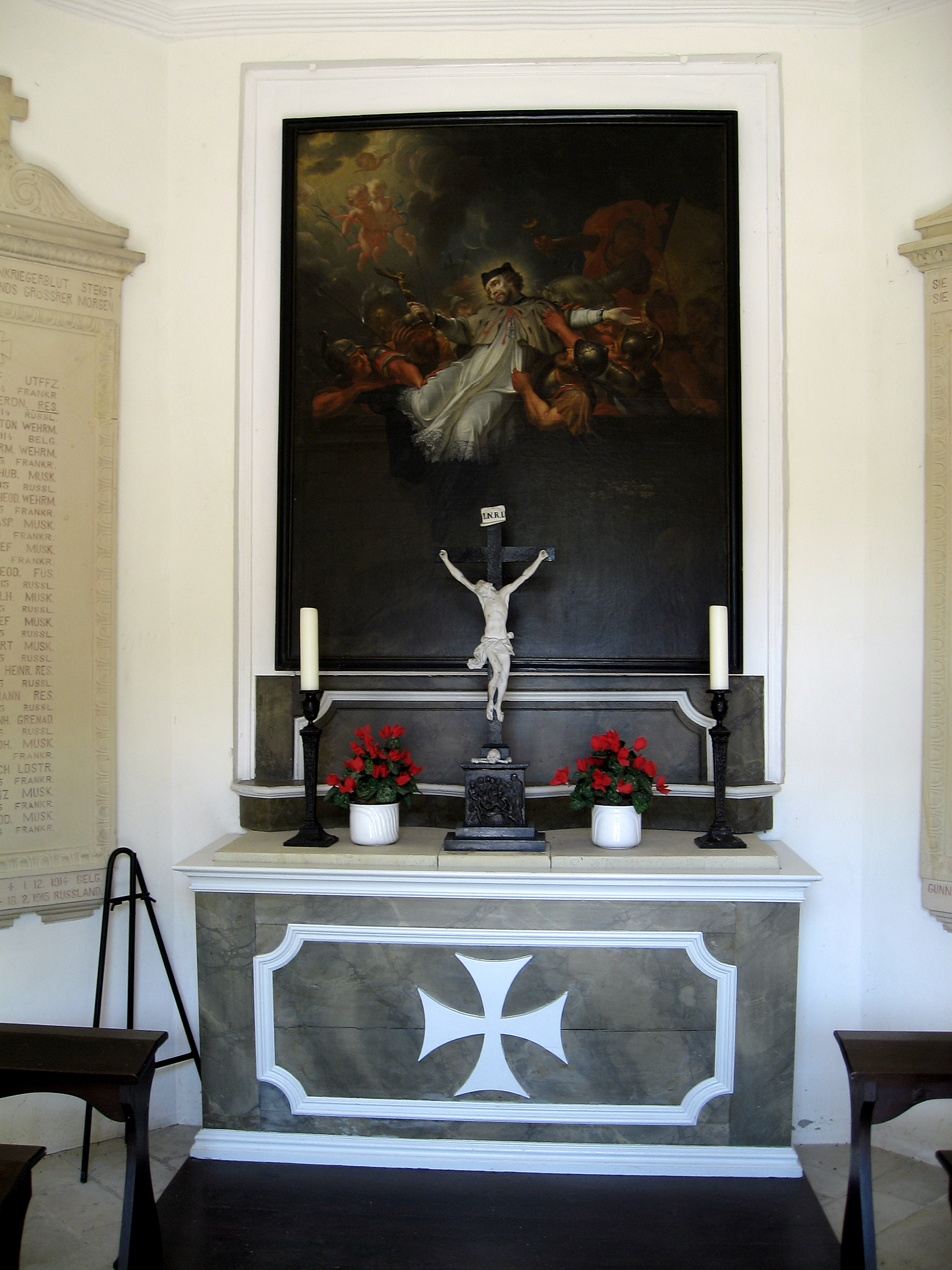 Kreis Coesfeld, Nordkirchen, Johannes-von-Nepomuk-Kapelle von 1722